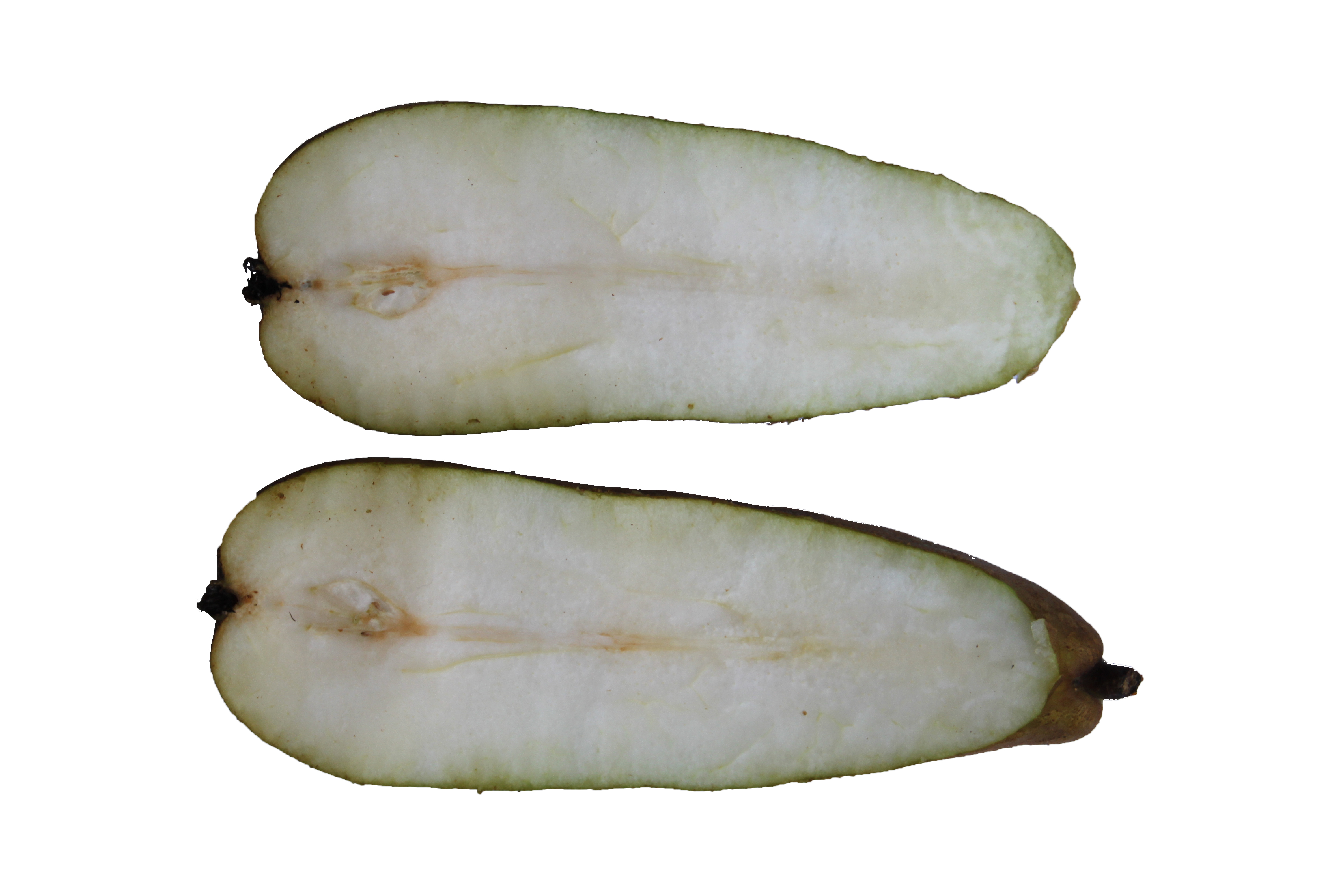 ohne Kerne